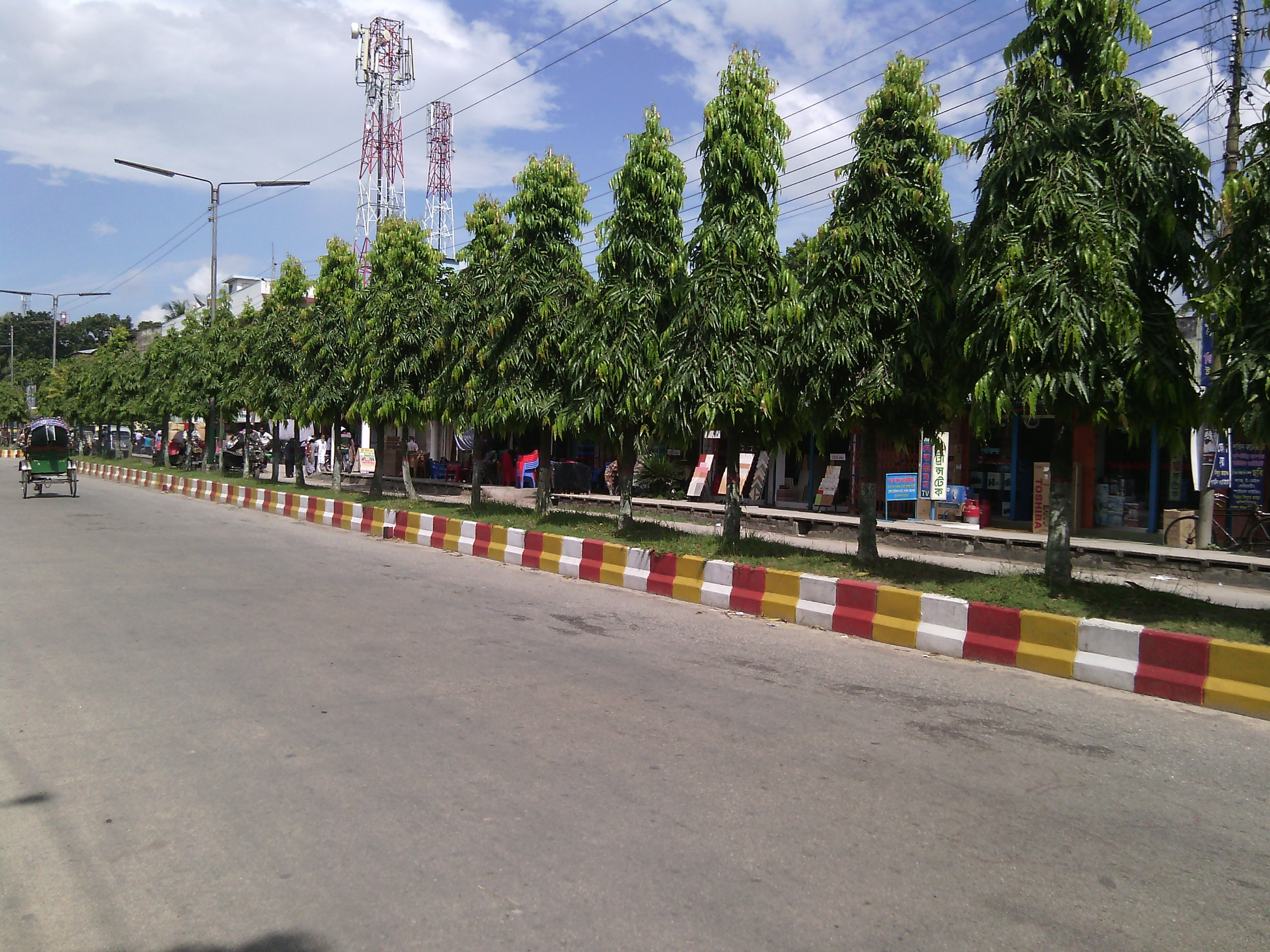 রাজবাড়ী সরকারি উচ্চ বিদ্যালয়ের সমনে থেকে প্রধান সড়কের দৃশ্য ফটোগ্রাফঃ Tanmoy Datta